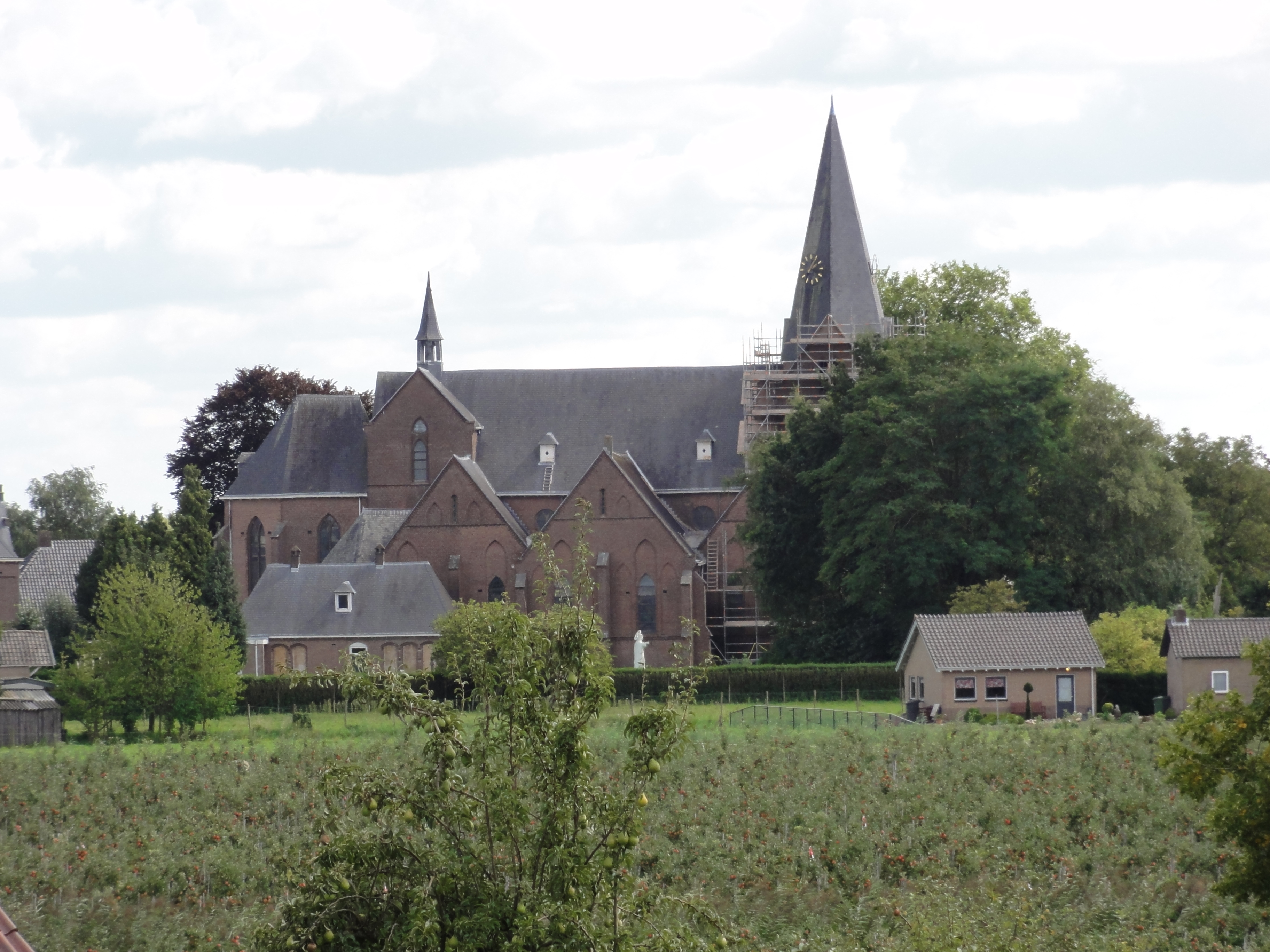 Boven-Leeuwen Rijksmonument 523086 kerk Past.Schoenmakersstr 2